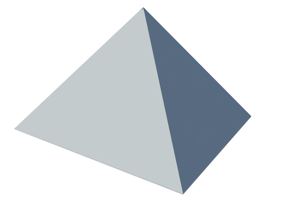 Verkleidete und geglättete Pyramide